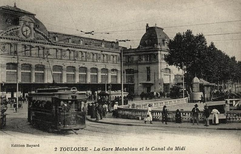 Toulouse, Haute-Garonne, gare de Matabiau et canal du Midi, vieille carte postale.